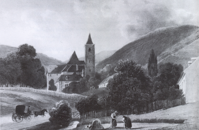 Sievering im Biedermeier, im Vordergrund der Arbesbach, im Hintergrund die Sieveringer Pfarrkirche